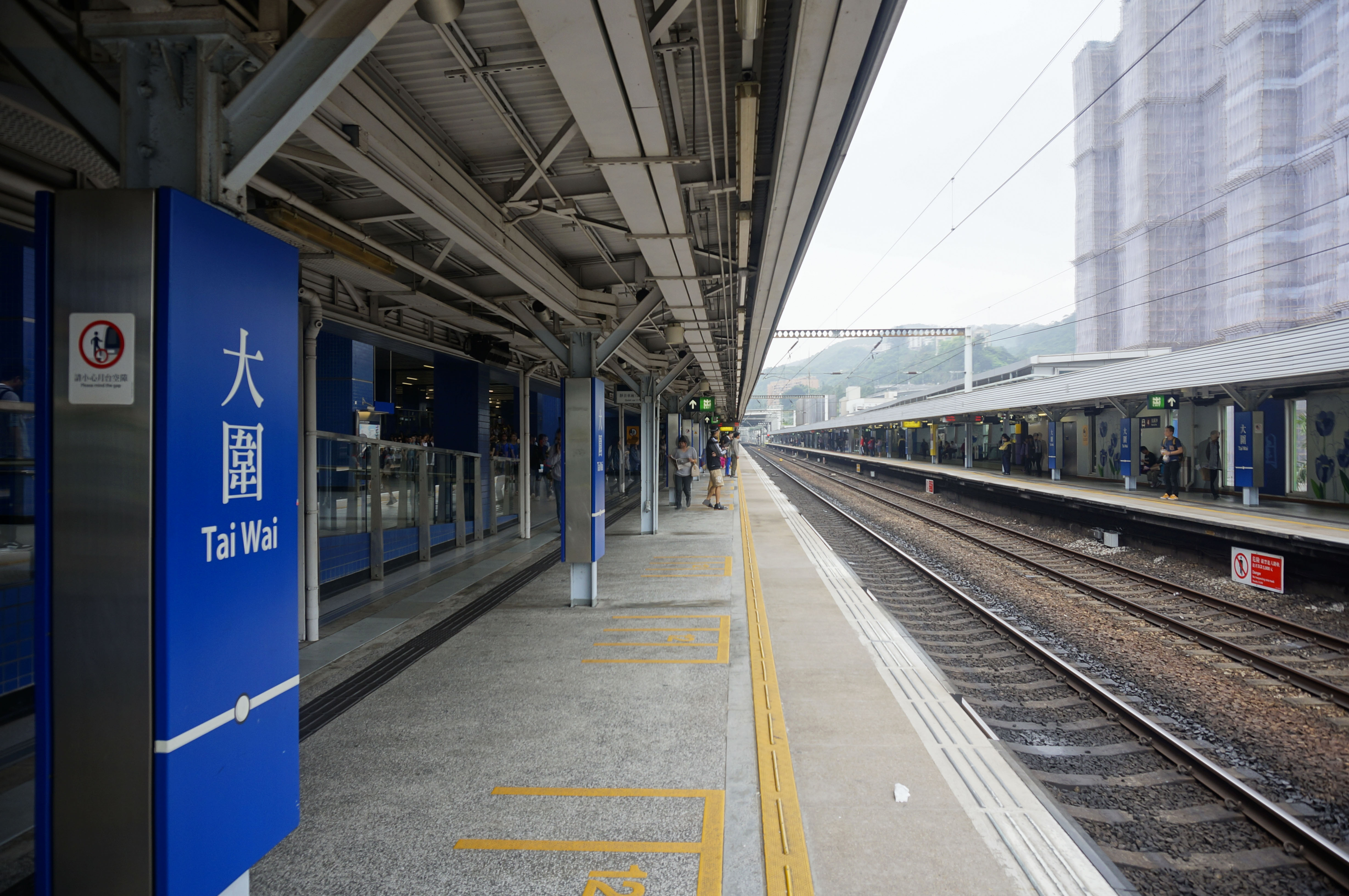 港鐵大圍站月台